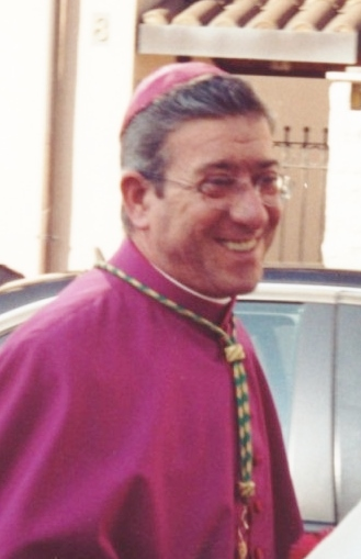 Sua Ecc.za Rev.ma Mons. Salvatore Visco, Arcivescovo di Capua.